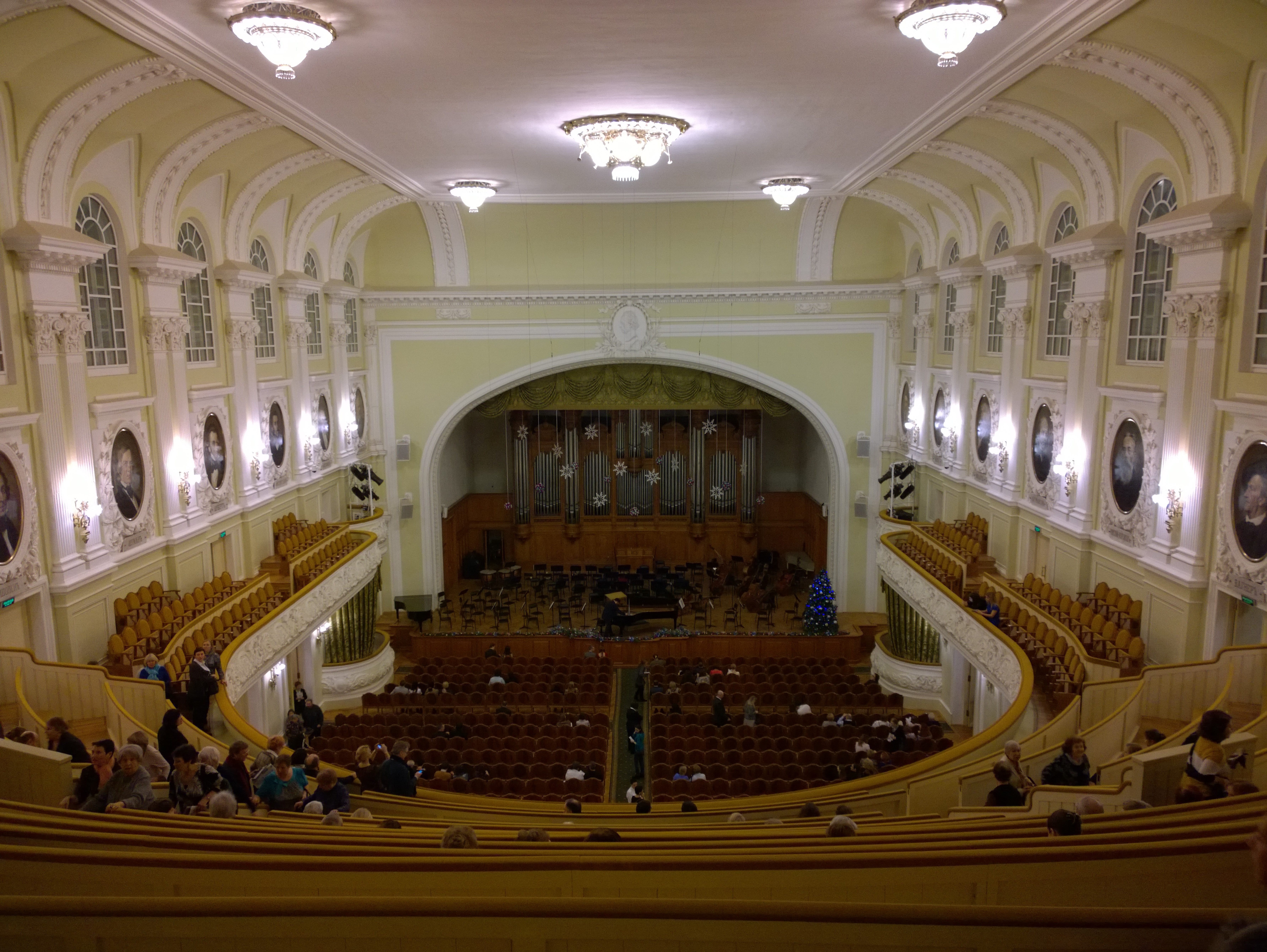 Консерватория - БЗК